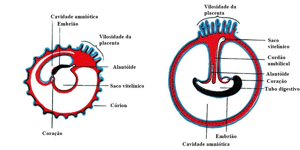 Desenvolvimento da placenta em mamíferos